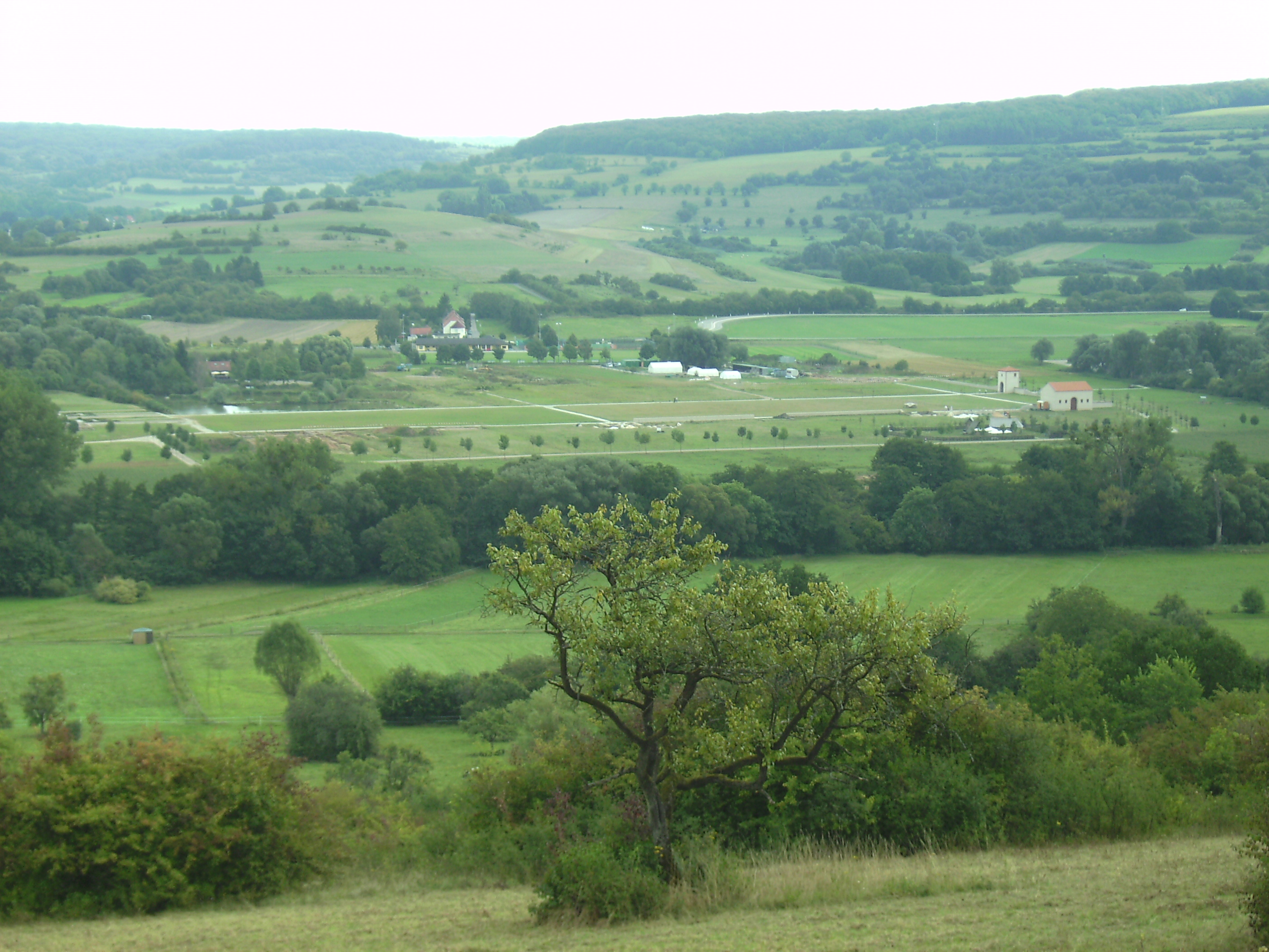 Reinheim (Gersheim): Ausgrabungsfeld